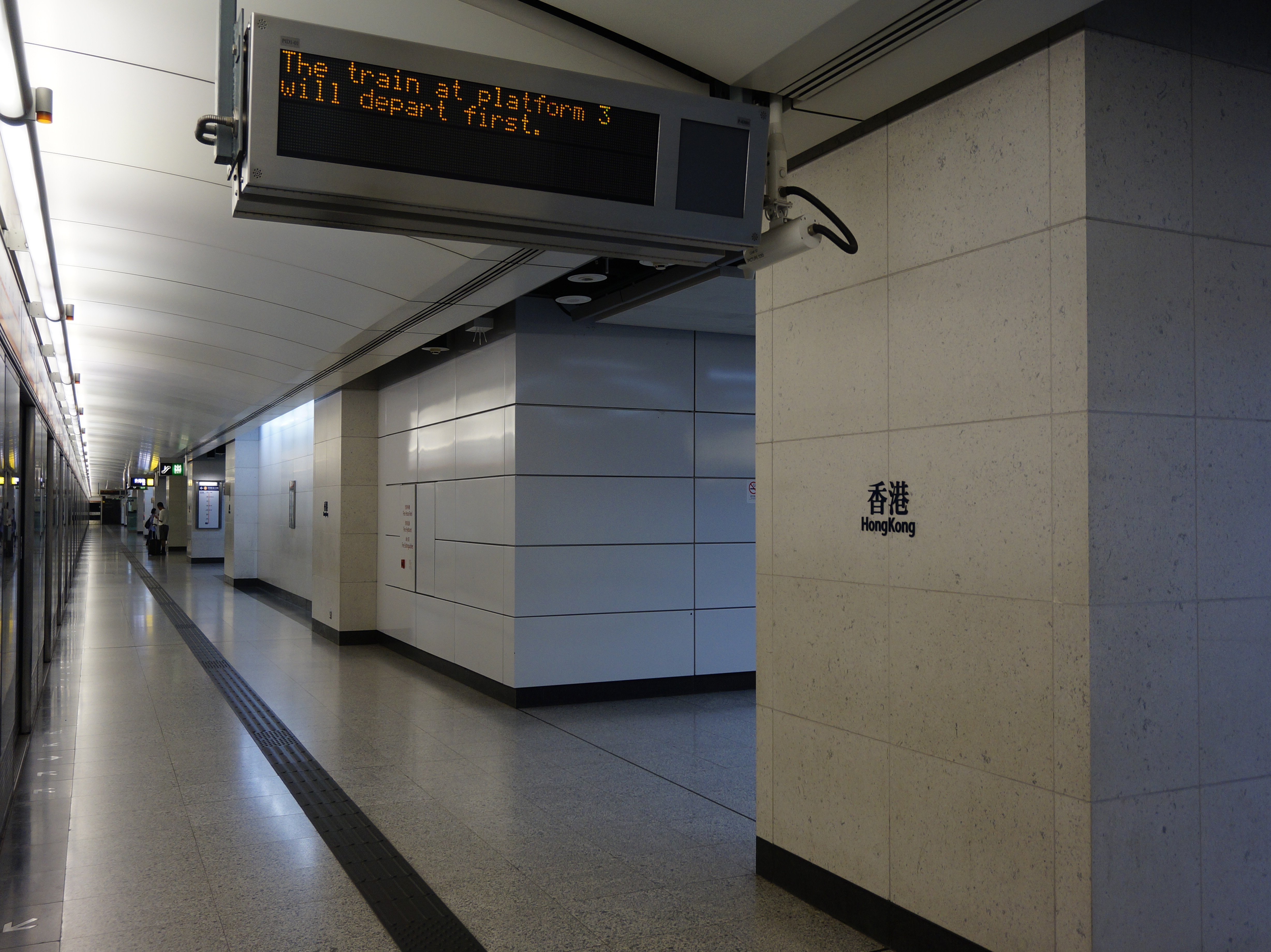 港鐵香港站東涌線月台